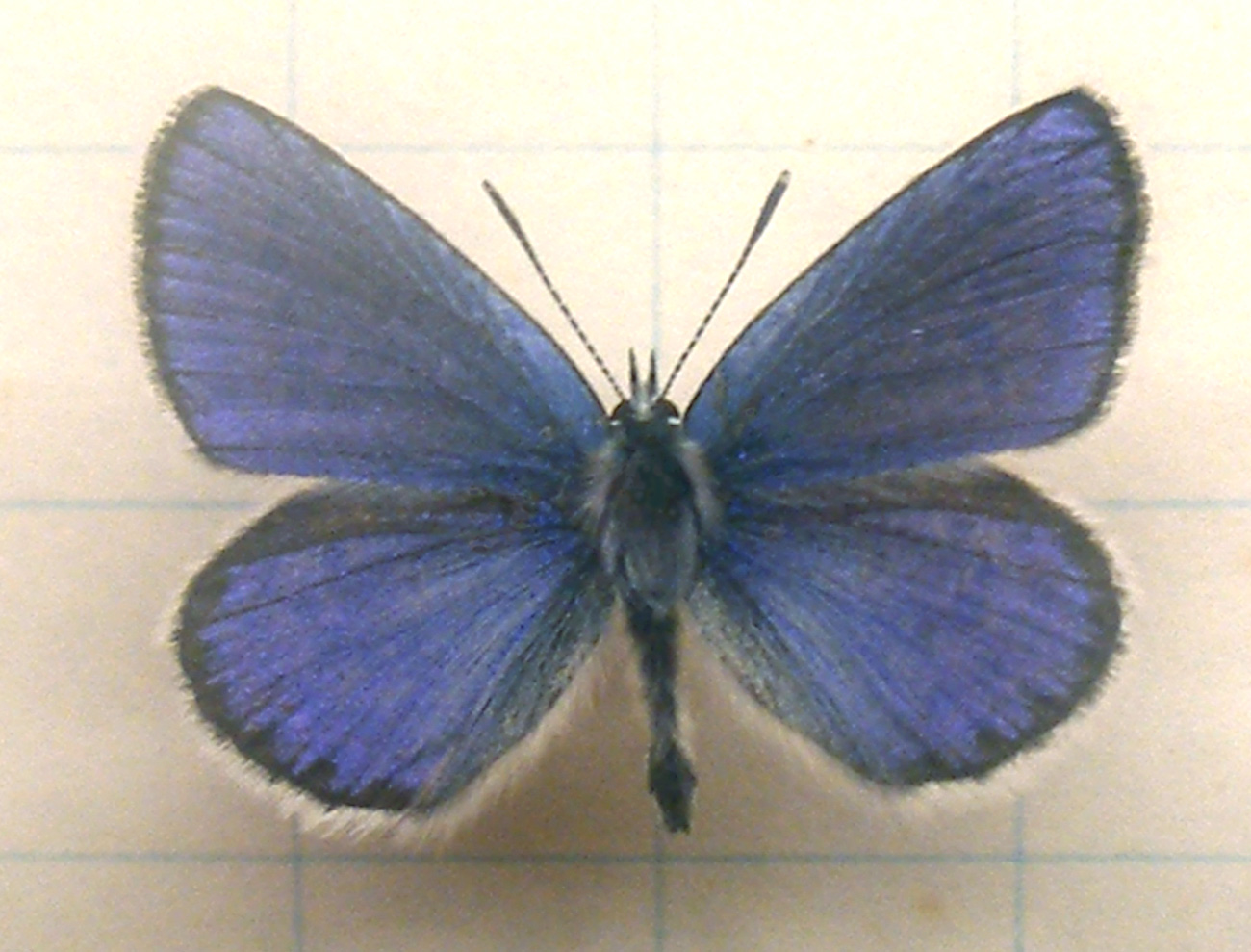 Plebeius idas male (Linnaeus, 1761)